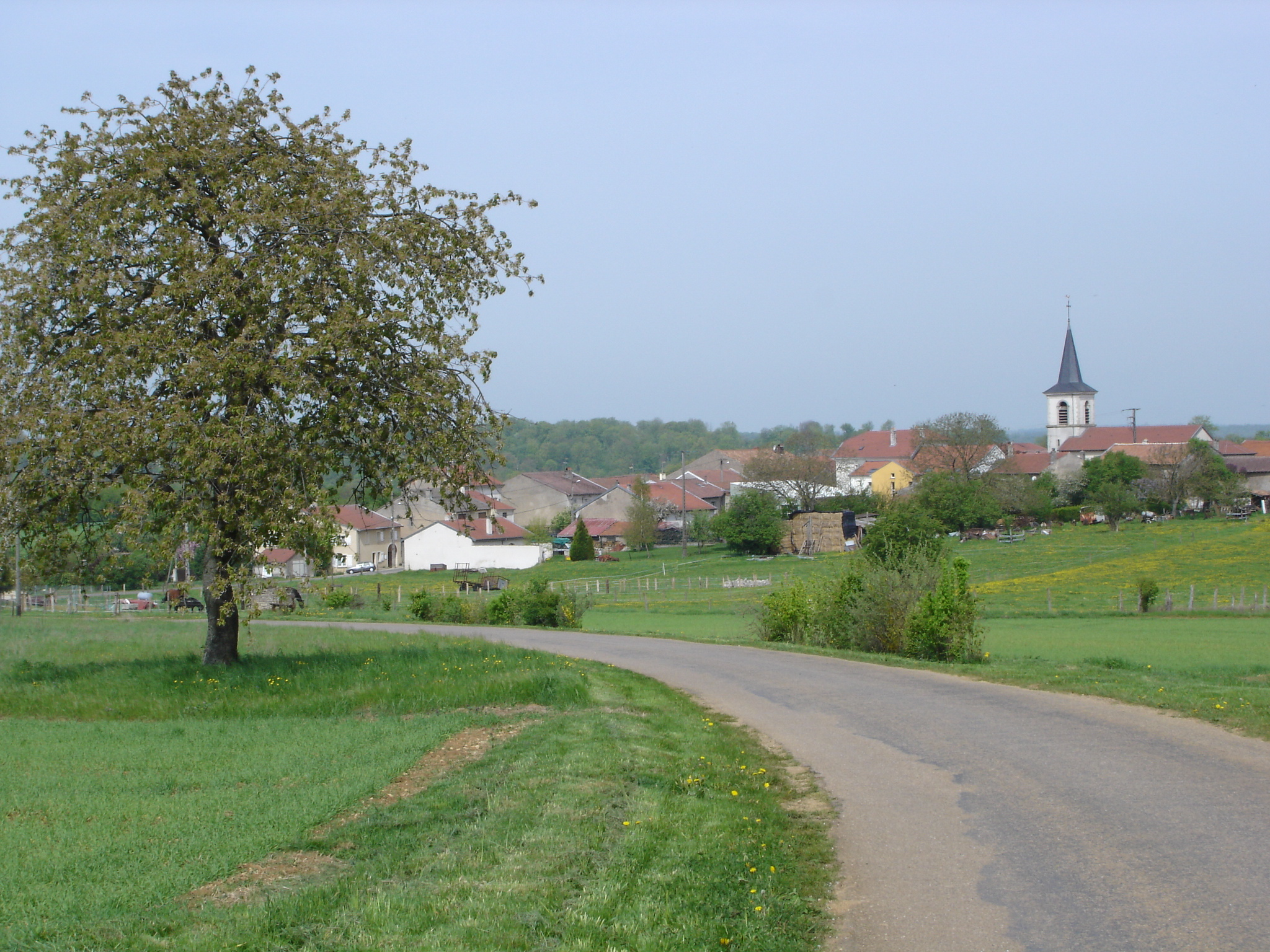 Le village de Rogéville, en Meurthe-et-Moselle -- Photo amateur prise par moi-même